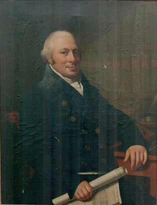 portrait Louis Frerejean (2)